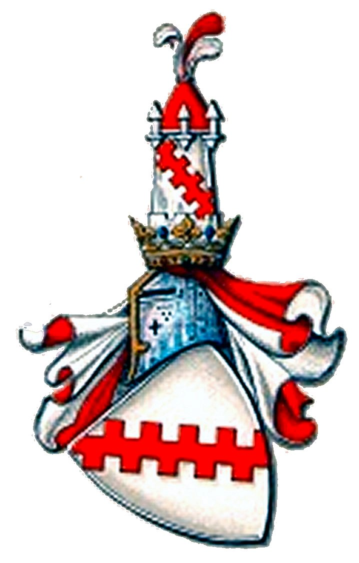 Romanisches Wappen der Freiherren von Donop, (neu coloriert von Kurt Frhr.v.Donop